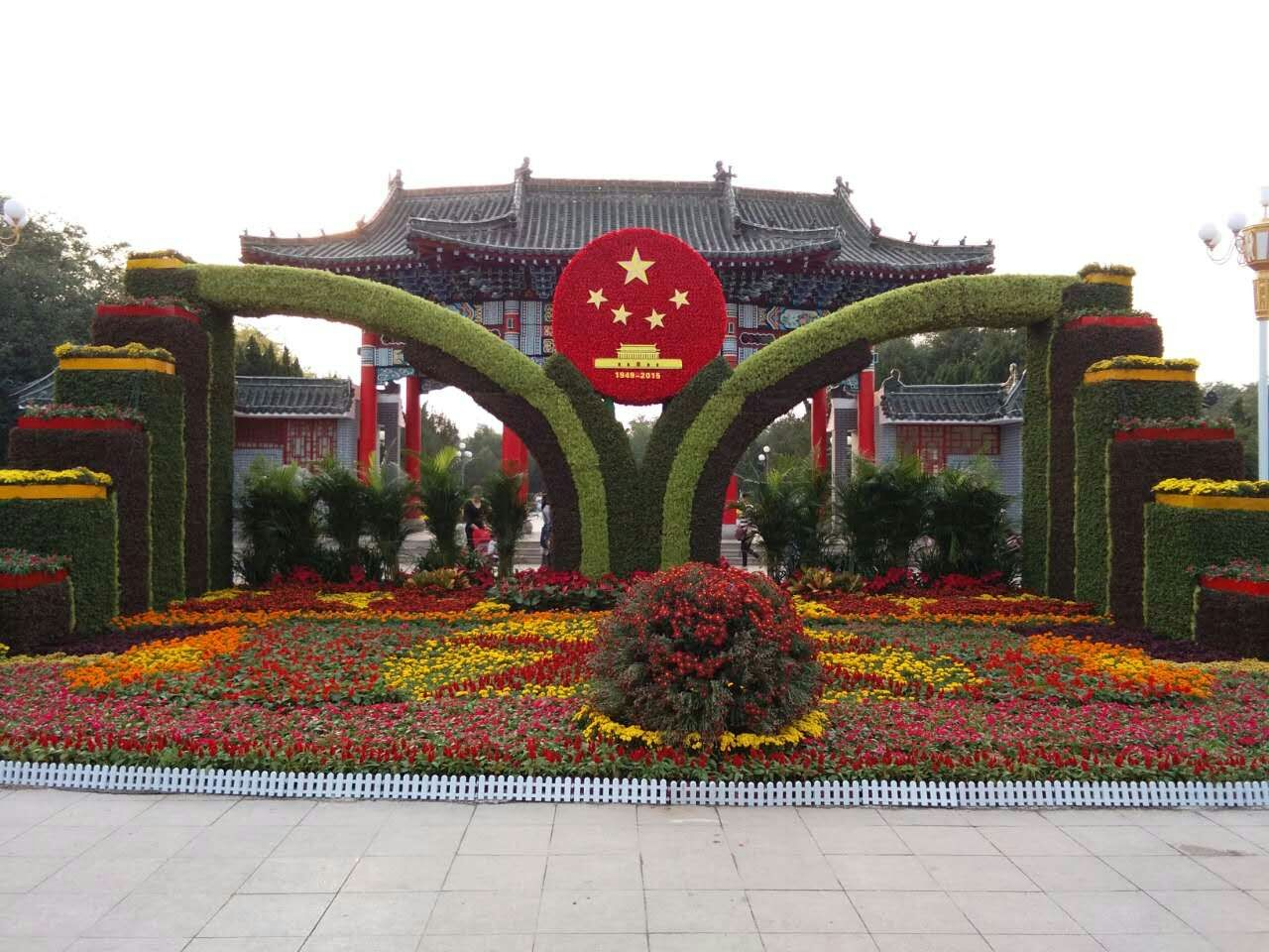 2015年十一黄金周期间的仓圣公园门口